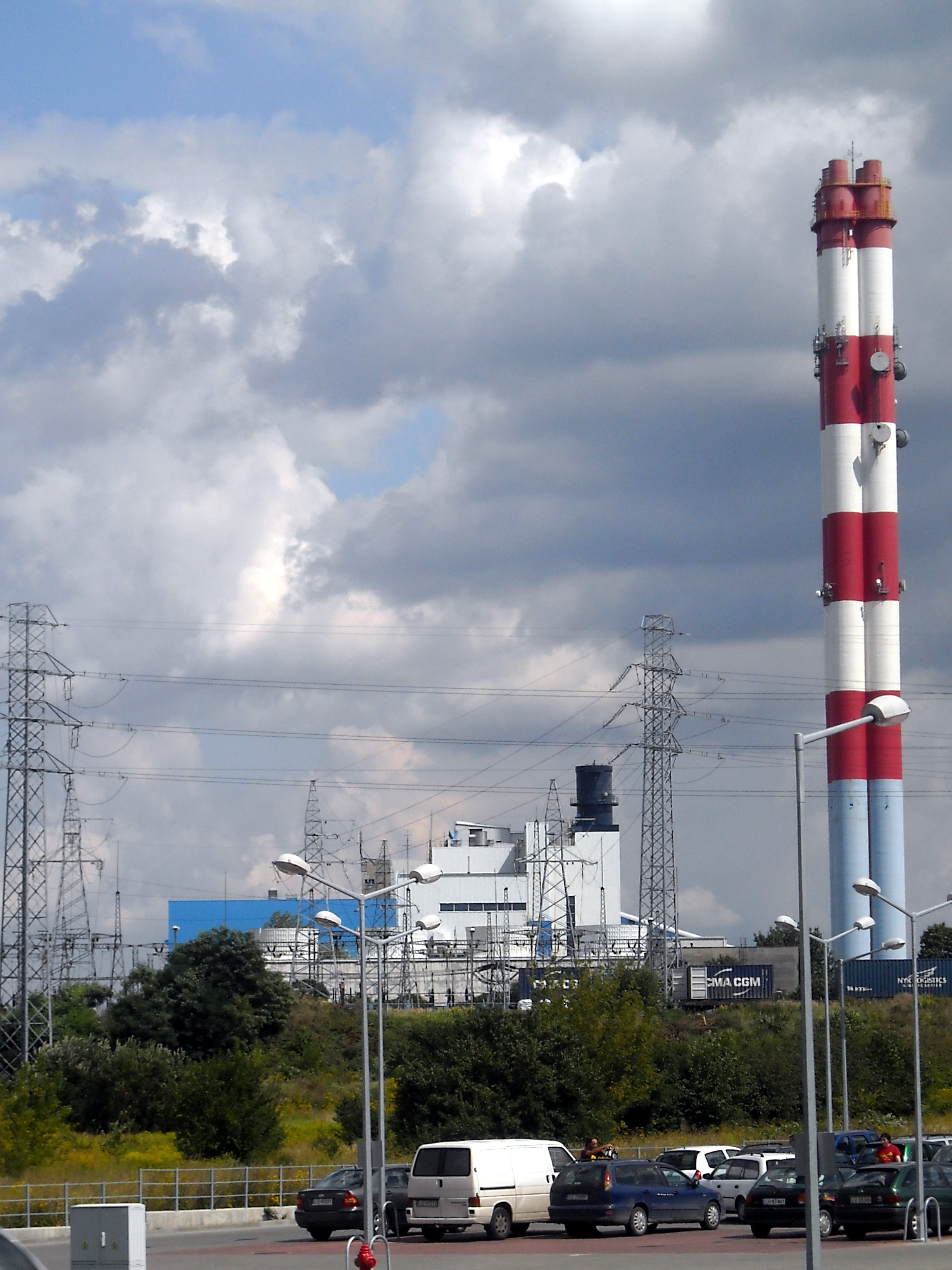 Elektrociepłownia Lublin-Wrotków przy ul. Inżynierskiej - widok od ul. Diamentowej